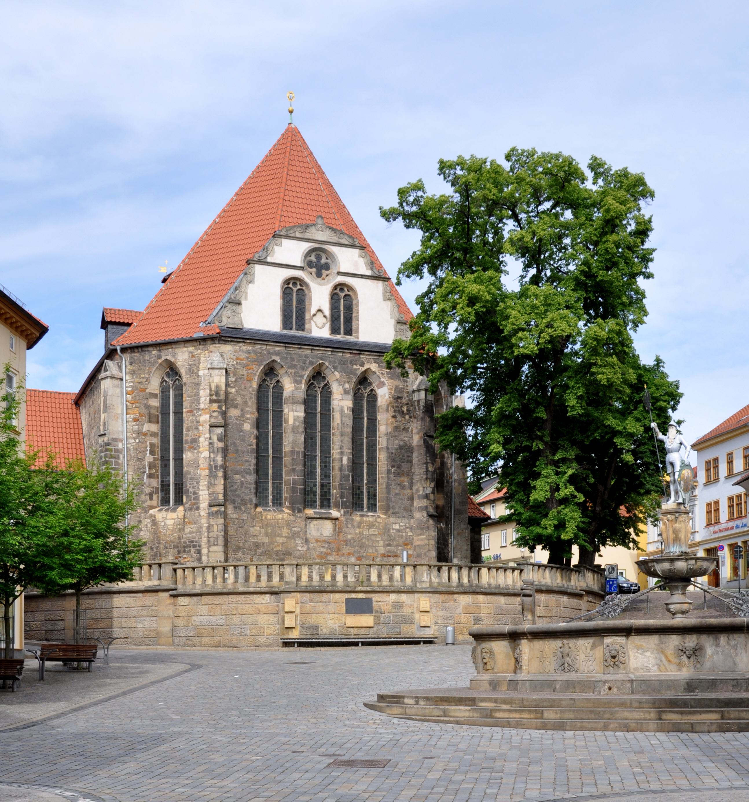 Arnstadt (Thüringen), Bachkirche